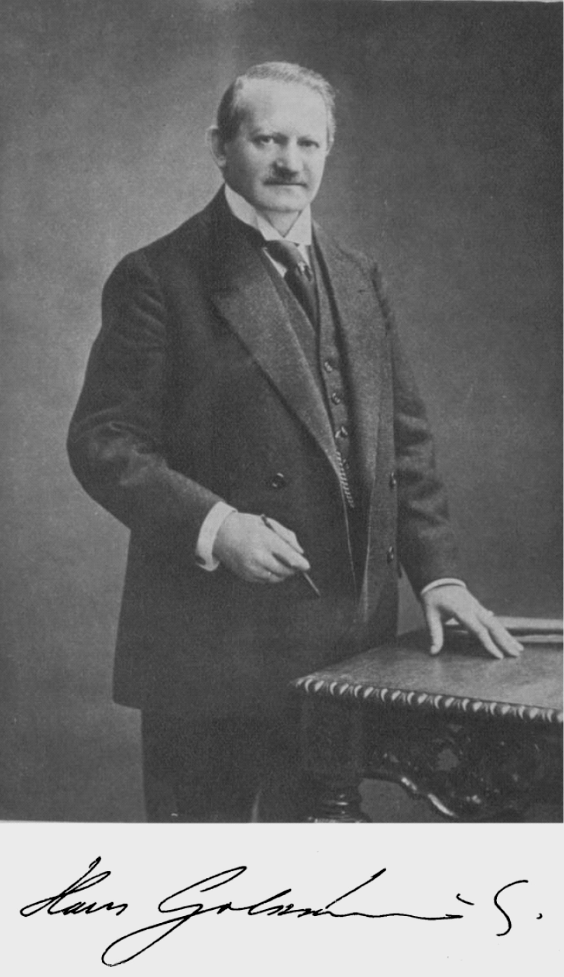 Hans Goldschmidt (* 18. Januar 1861 in Berlin; † 21. Mai 1923 in Baden-Baden)